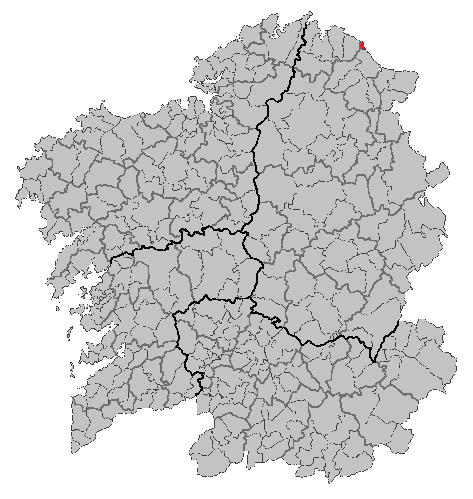 Mapa coa localización do concello de Burela.